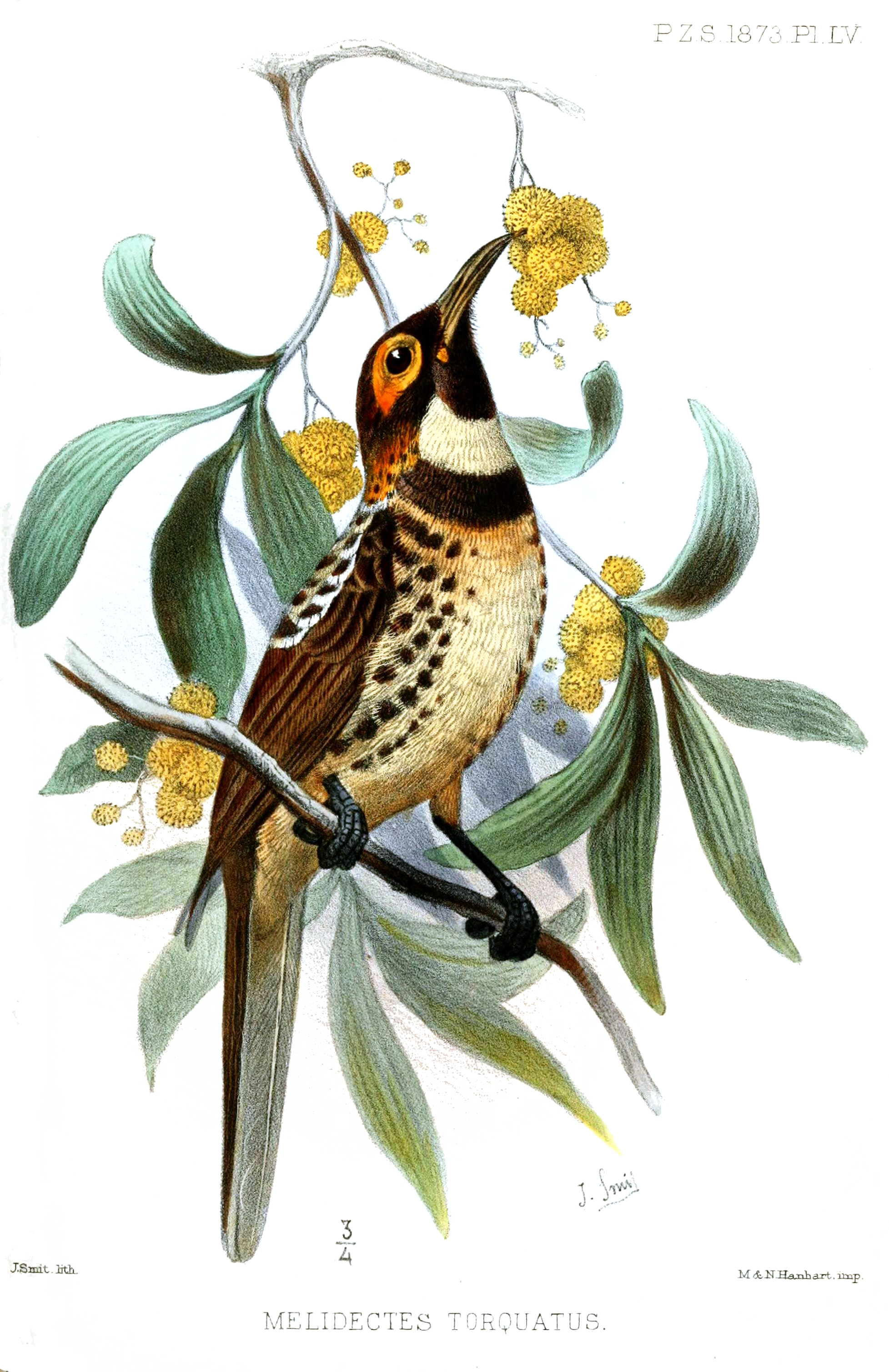 Melidectes torquatus